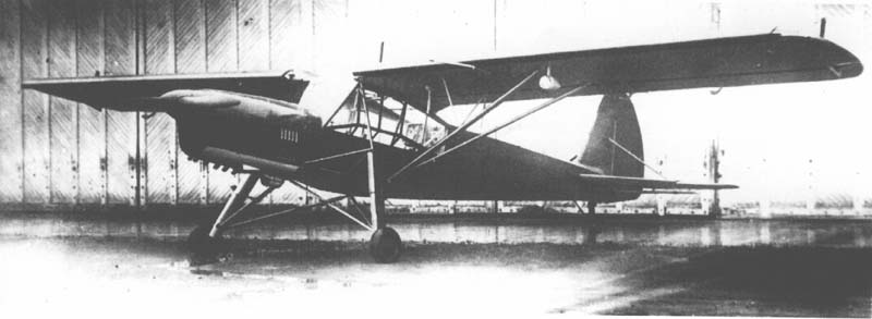 Sowjetische Kopie des FI156 Storch